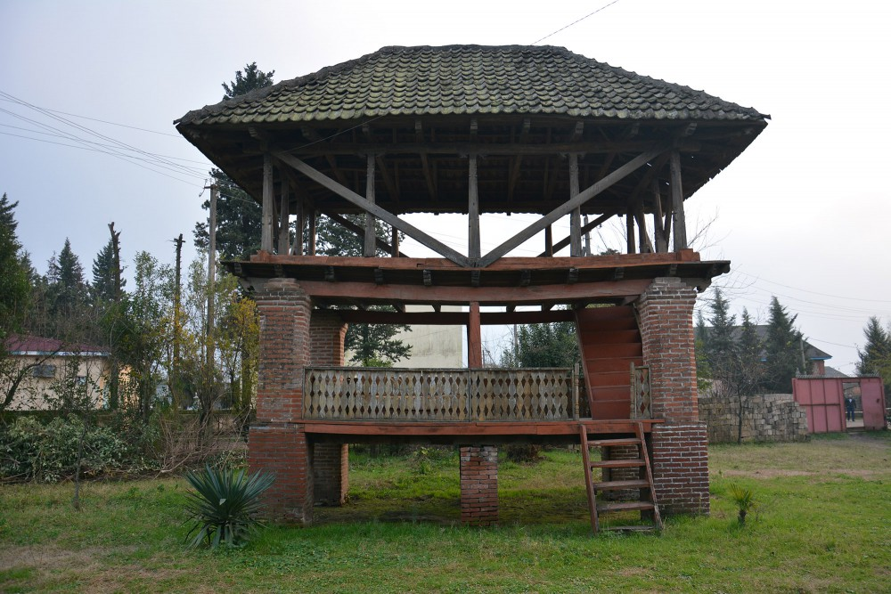 Azərbaycan Astara şəhəri Ərçivan qəsəbəsi tarixi abidə olan Ləm